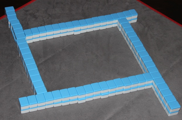 mur-ma-jiang